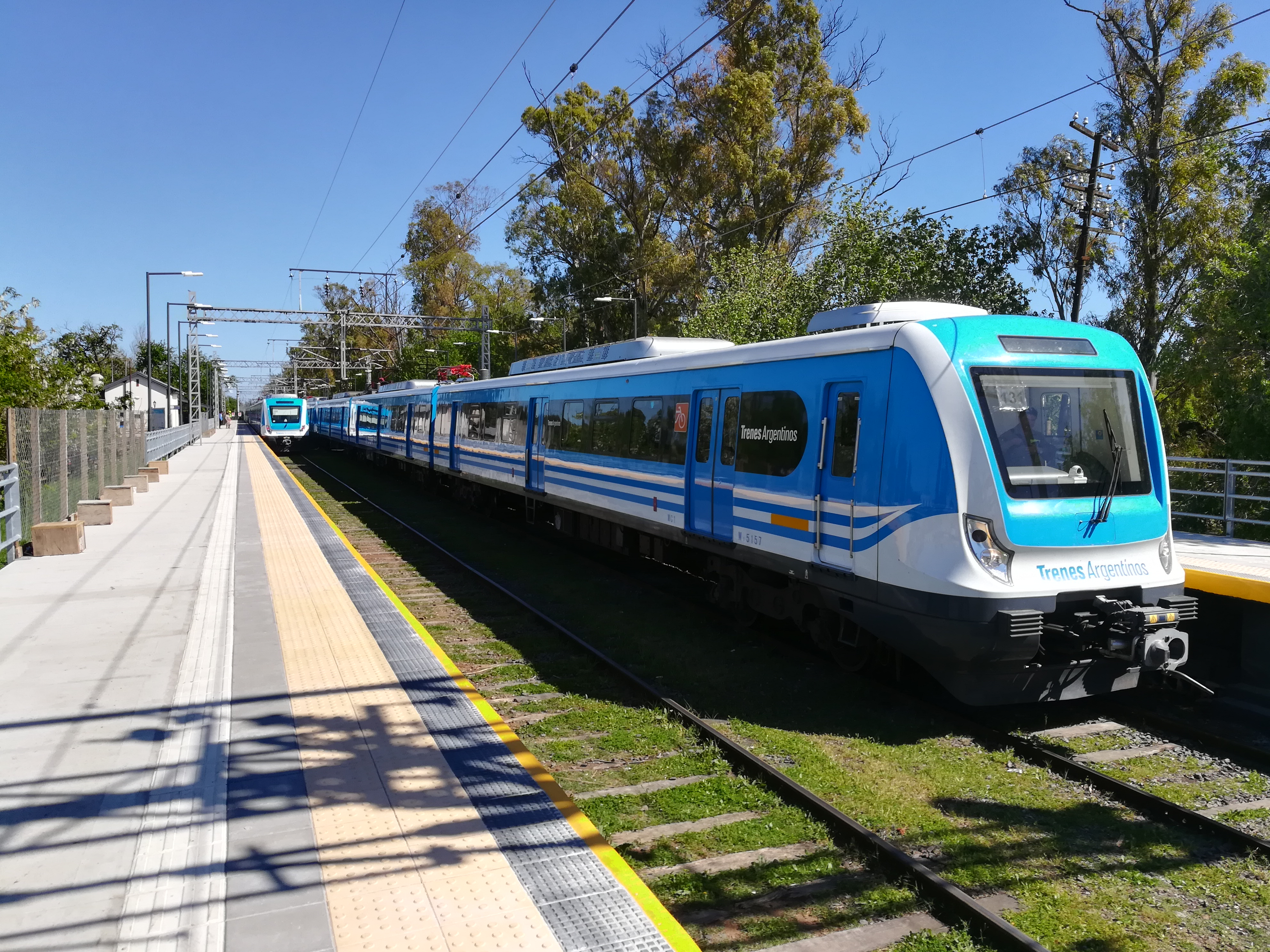 Dos formaciones CSR en la Estación Gonnet, durante su segundo día de servicio en el ramal La Plata